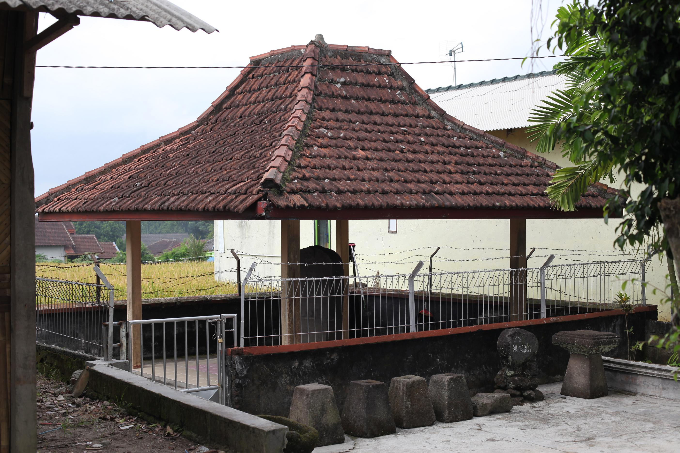 Prasasti Munggut (Munggut Inscription)